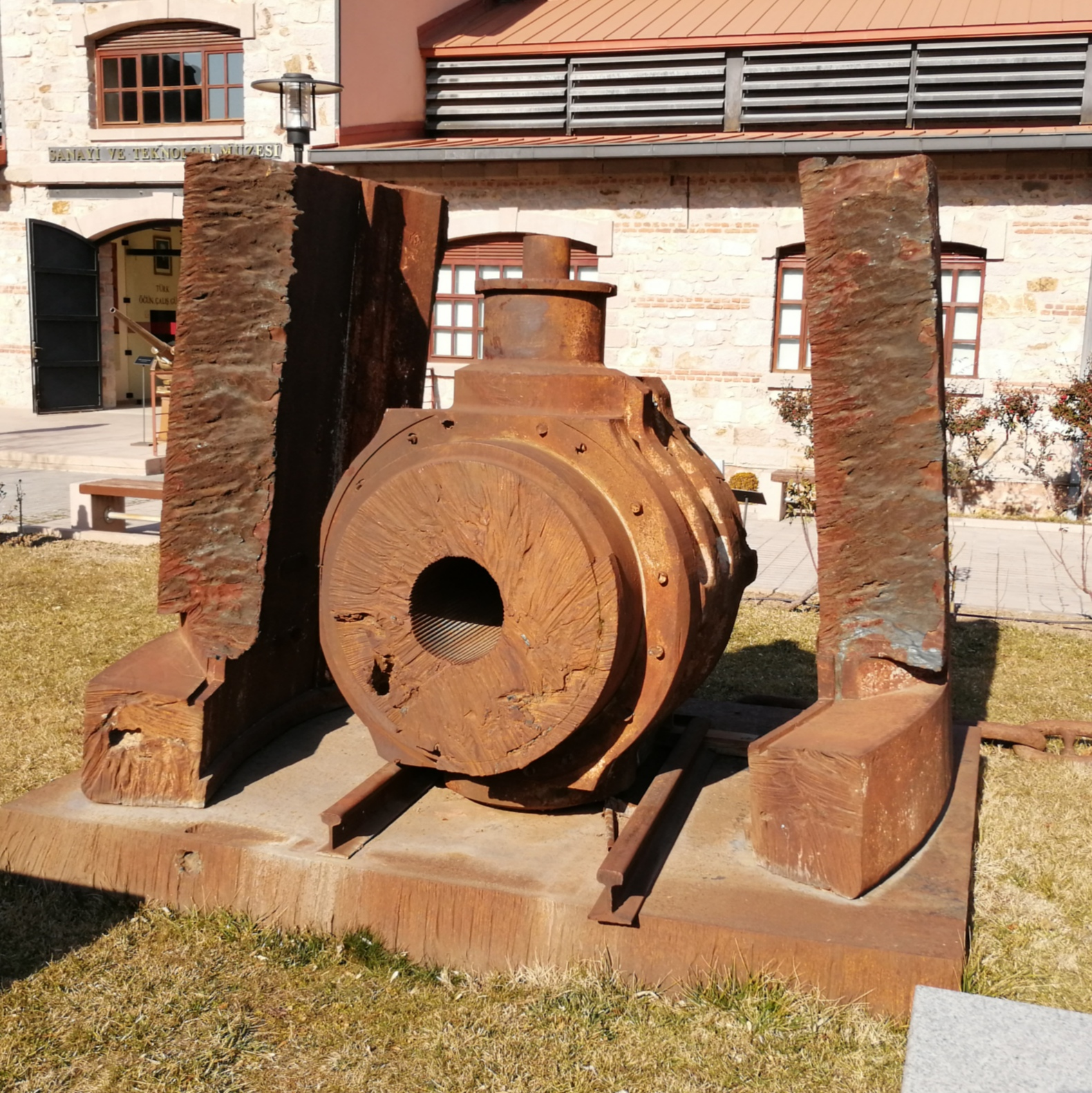 Osmanlı Devleti'nin 1. Dünya Savaşı'na girmesinde rol oynayan Yavuz Kruvazörü'nden geriye kalan az sayıdaki parçalardan; gövde zırhından ve topundan kesit. Ankara' daki MKEK müzesinde sergilenmektedir. Gemi 1973 yılında hurda olarak parçalanmıştır.